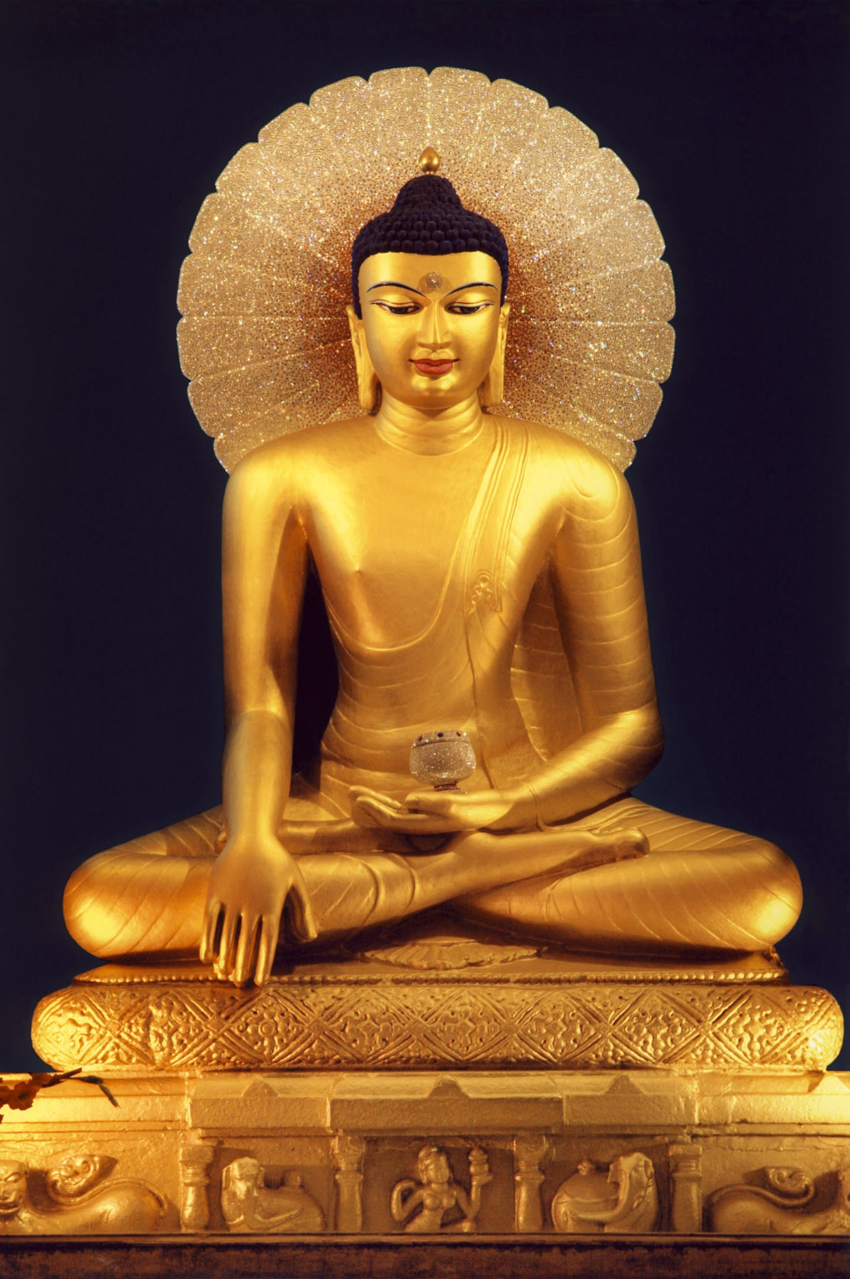 Тыва дыл: Шакьямуни Будда Бурган Башкы